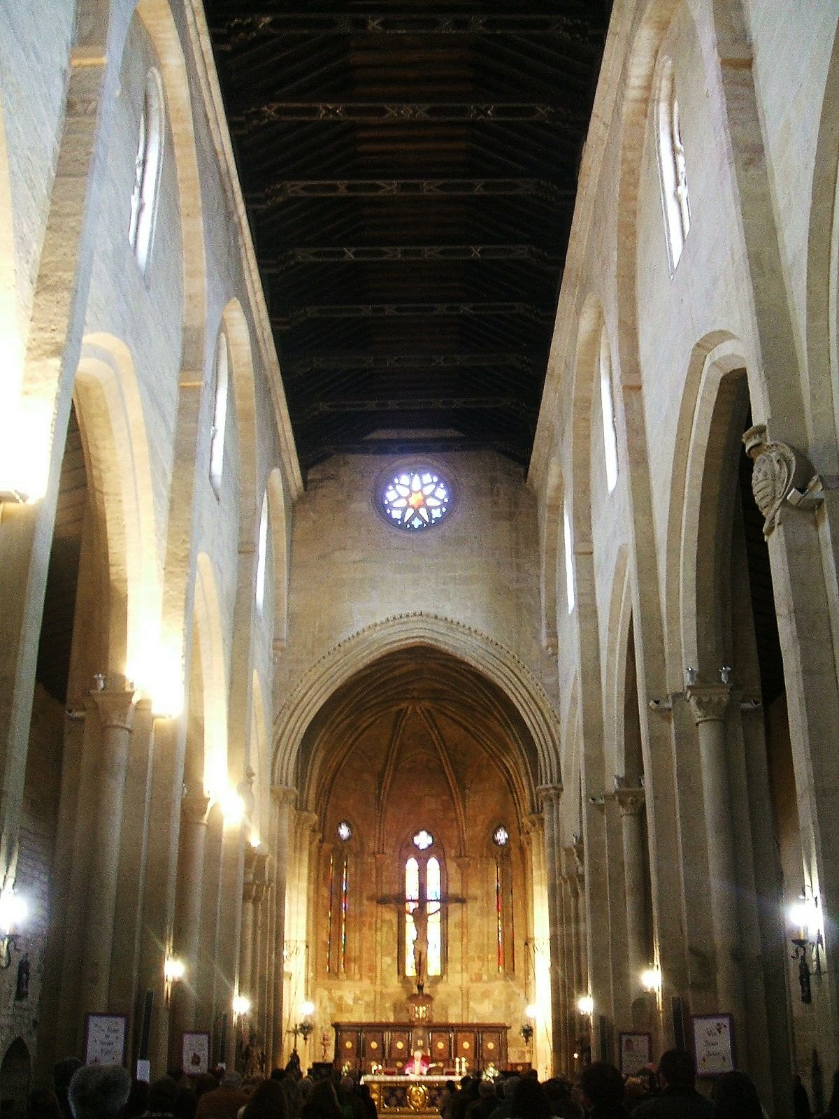 Cabecera de la iglesia de Santa Marina de Aguas Santas, Córdoba, España